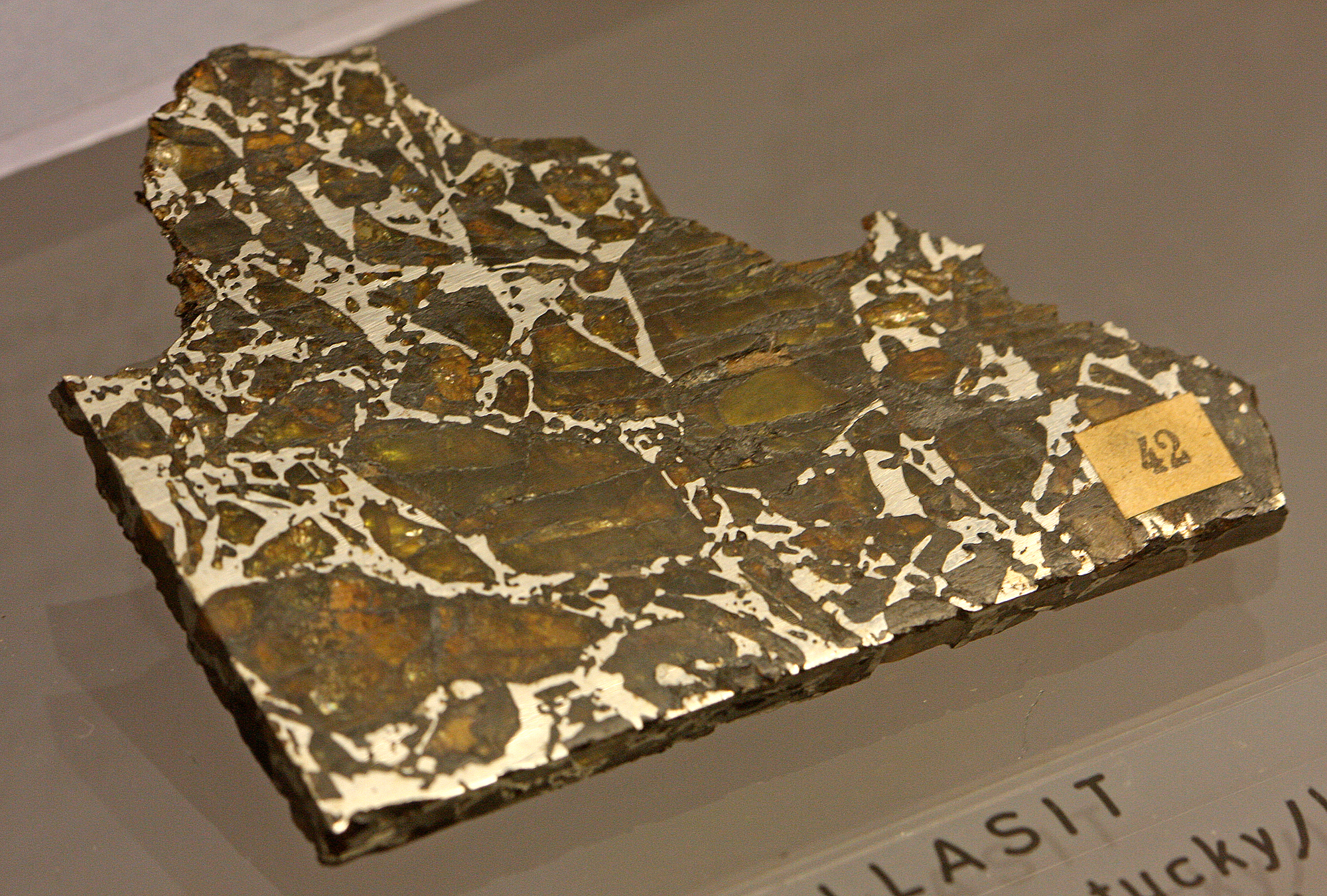 Pallasit, Fundort: Eagle Station, Kentucky/USA Mineralogisches Museum Bonn